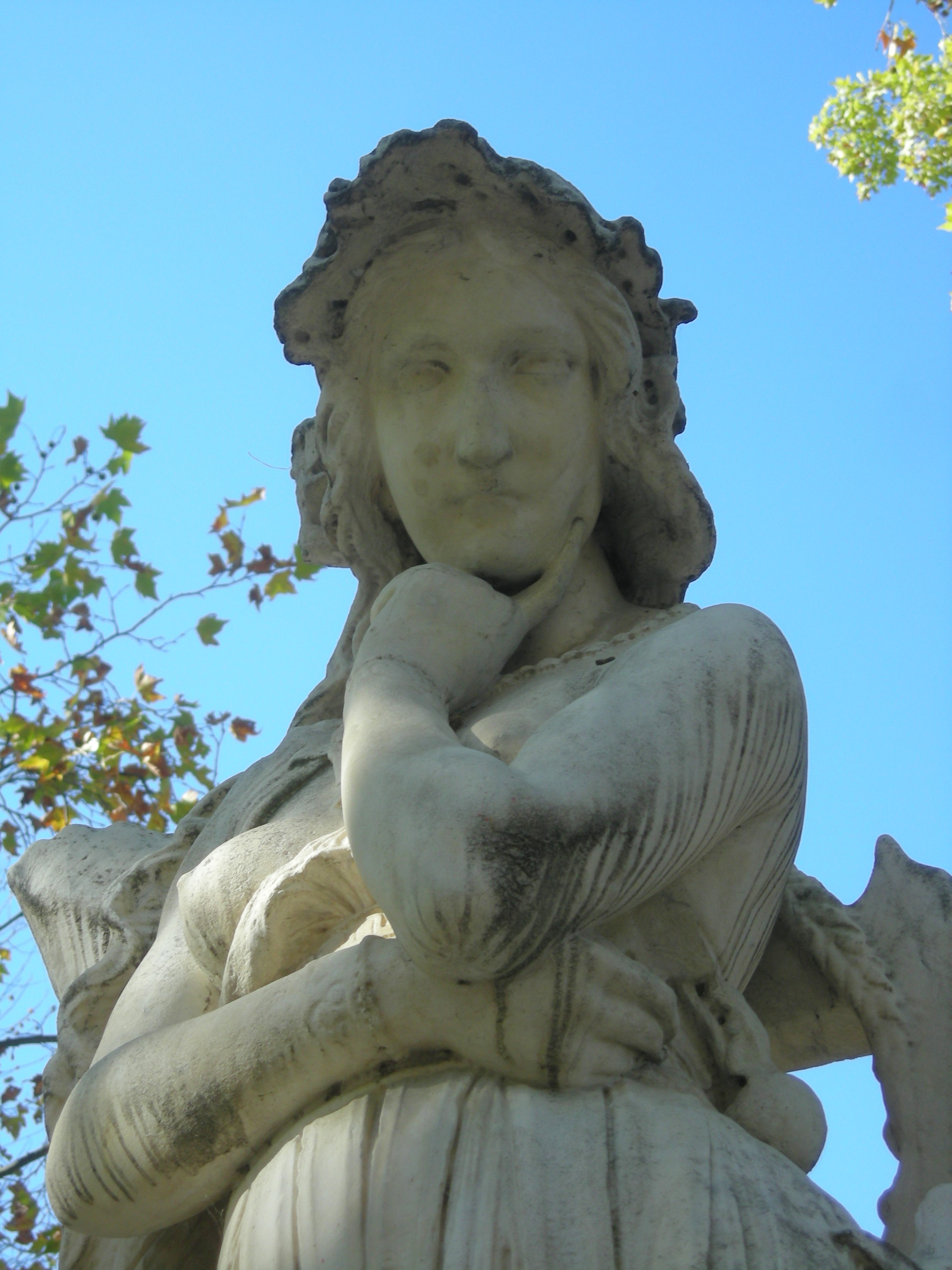 Vue rapprochée sur l’œuvre « Velléda contemplant la demeure d’Eudore » par Étienne Hippolyte Maindron, Jardin du Luxembourg, Paris.